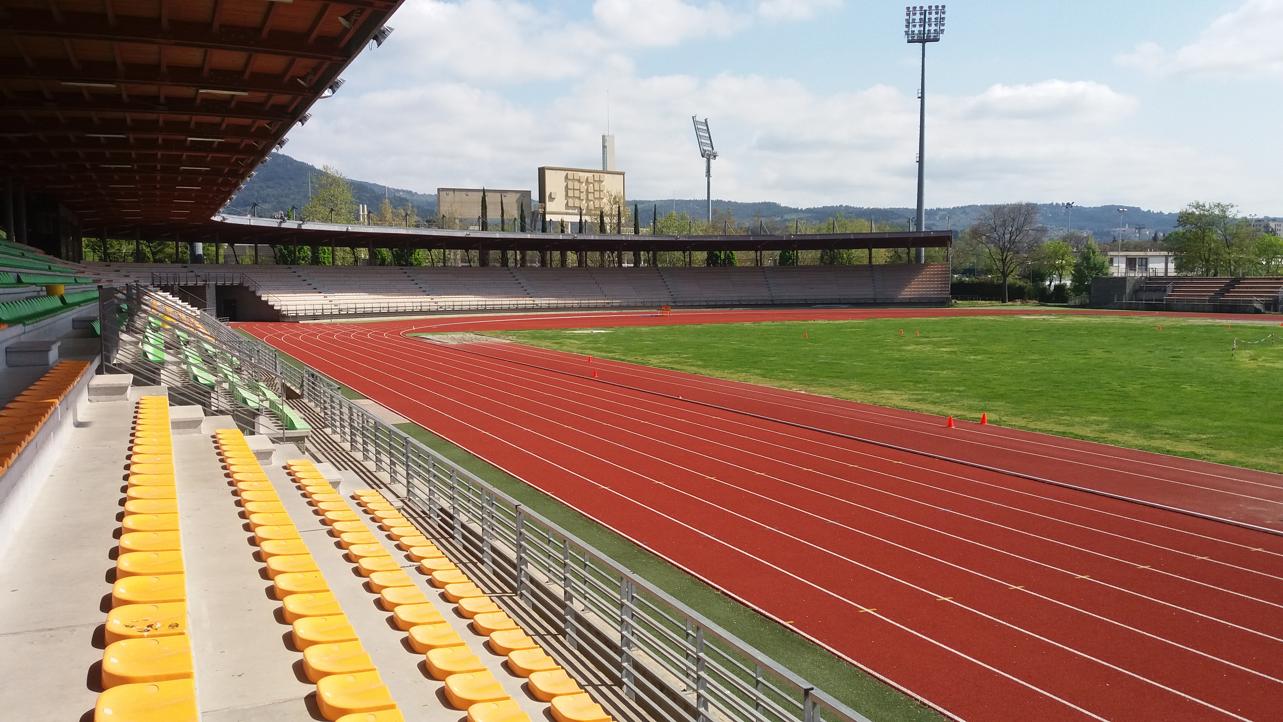 Stadio di atletica leggera Luigi Ridolfi a Campo di Marte, Firenze